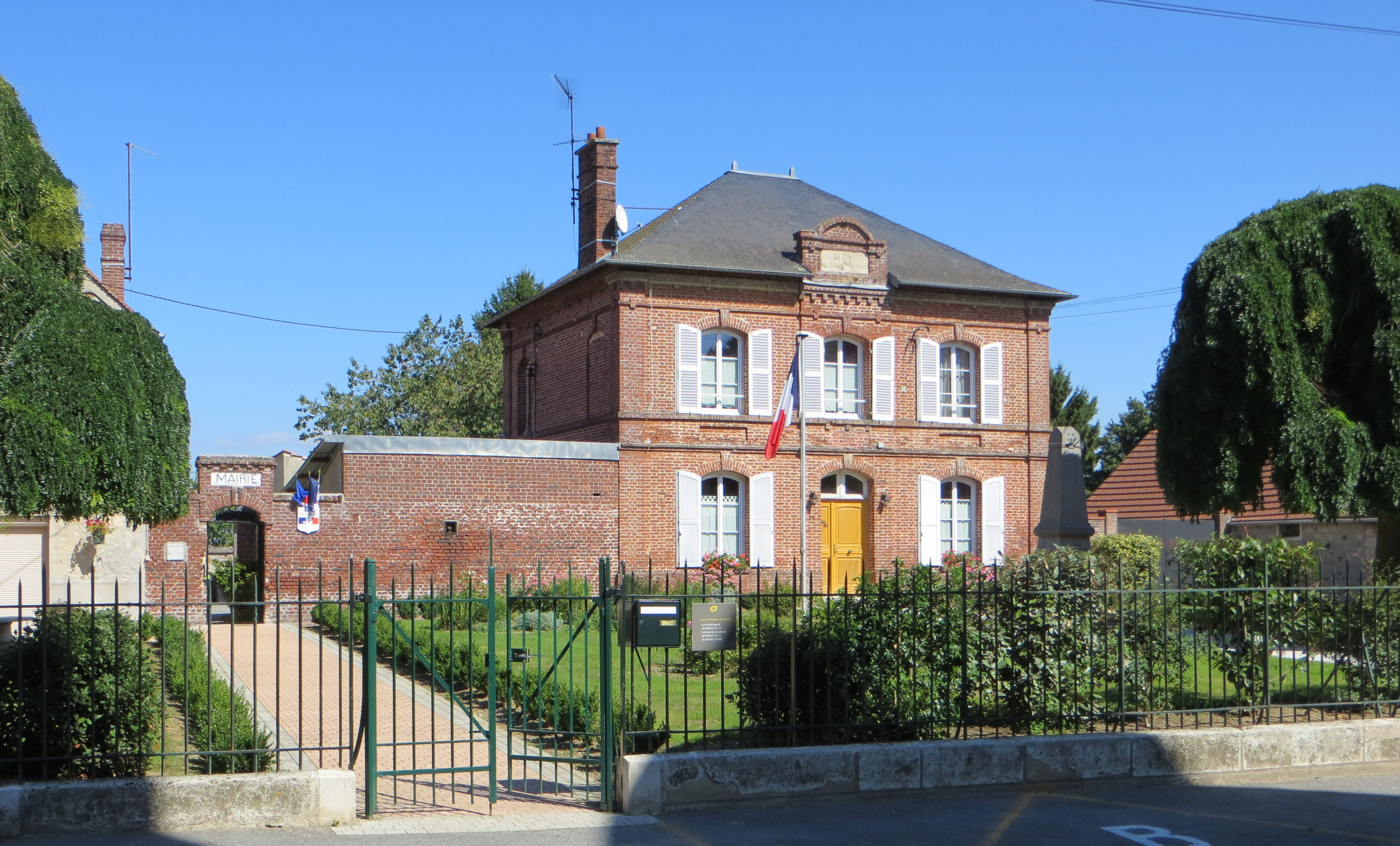 Mairie